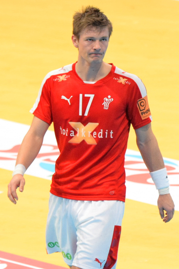 Le 10 janvier 2016 lors du match France / Danemark durant la Golden League à l'AccorHotels Arena (Paris).